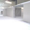 Exemple de cloisons avec avancées(casquettes)